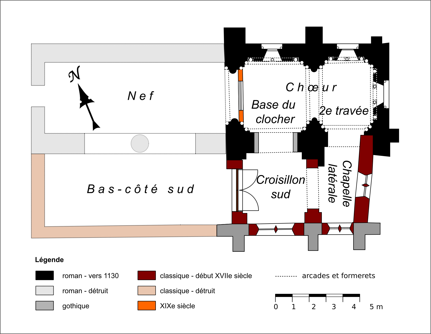 Plan de l'ancienne église Saint-Rieul de Louvres (95), sans l'escalier du XIXe siècle desservant l'étage bâti à cette époque.